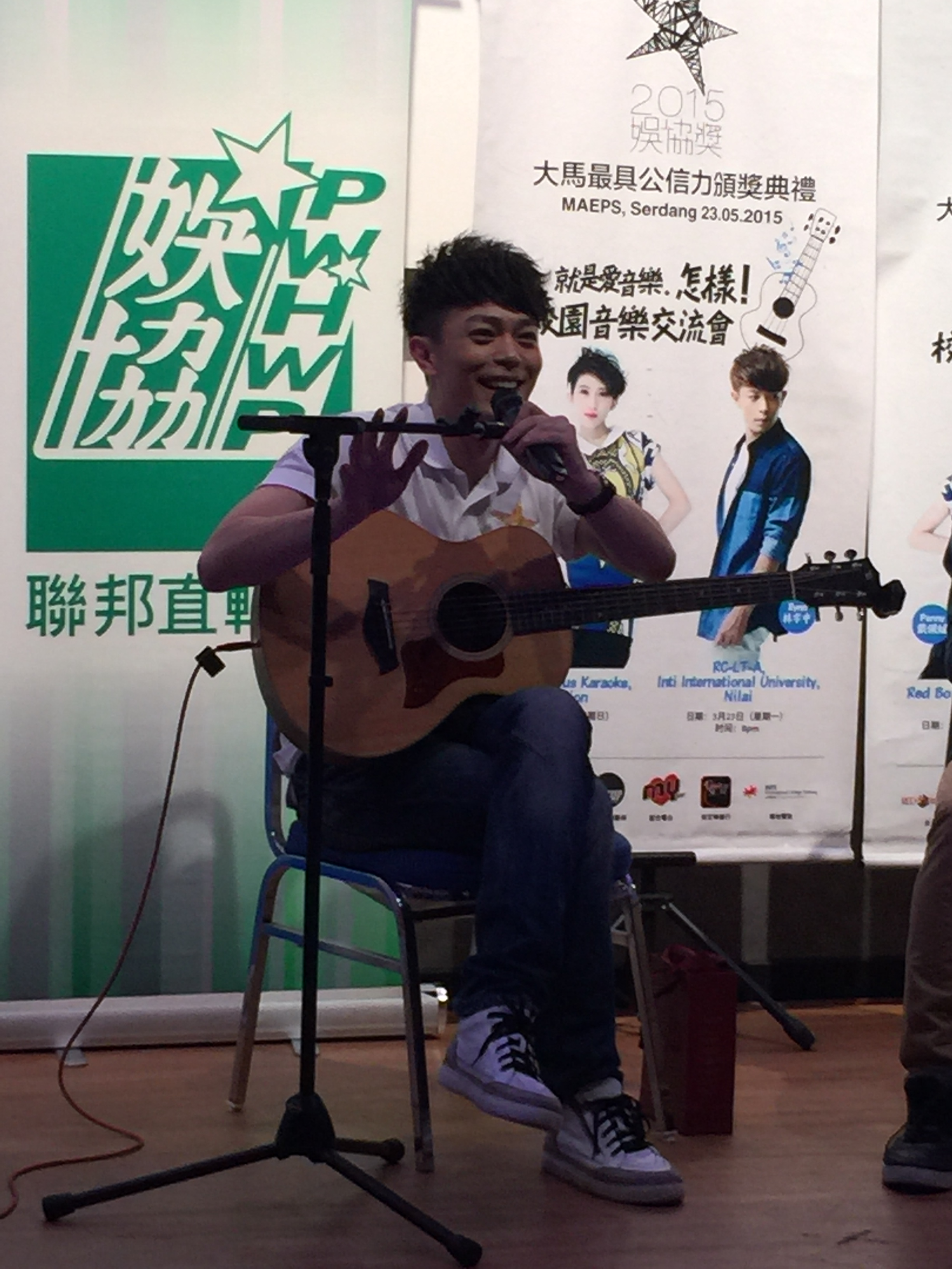 照片攝於2015年03月23日，林宇中出席2015娛協獎在馬來西亞英迪大學的校園交流會。